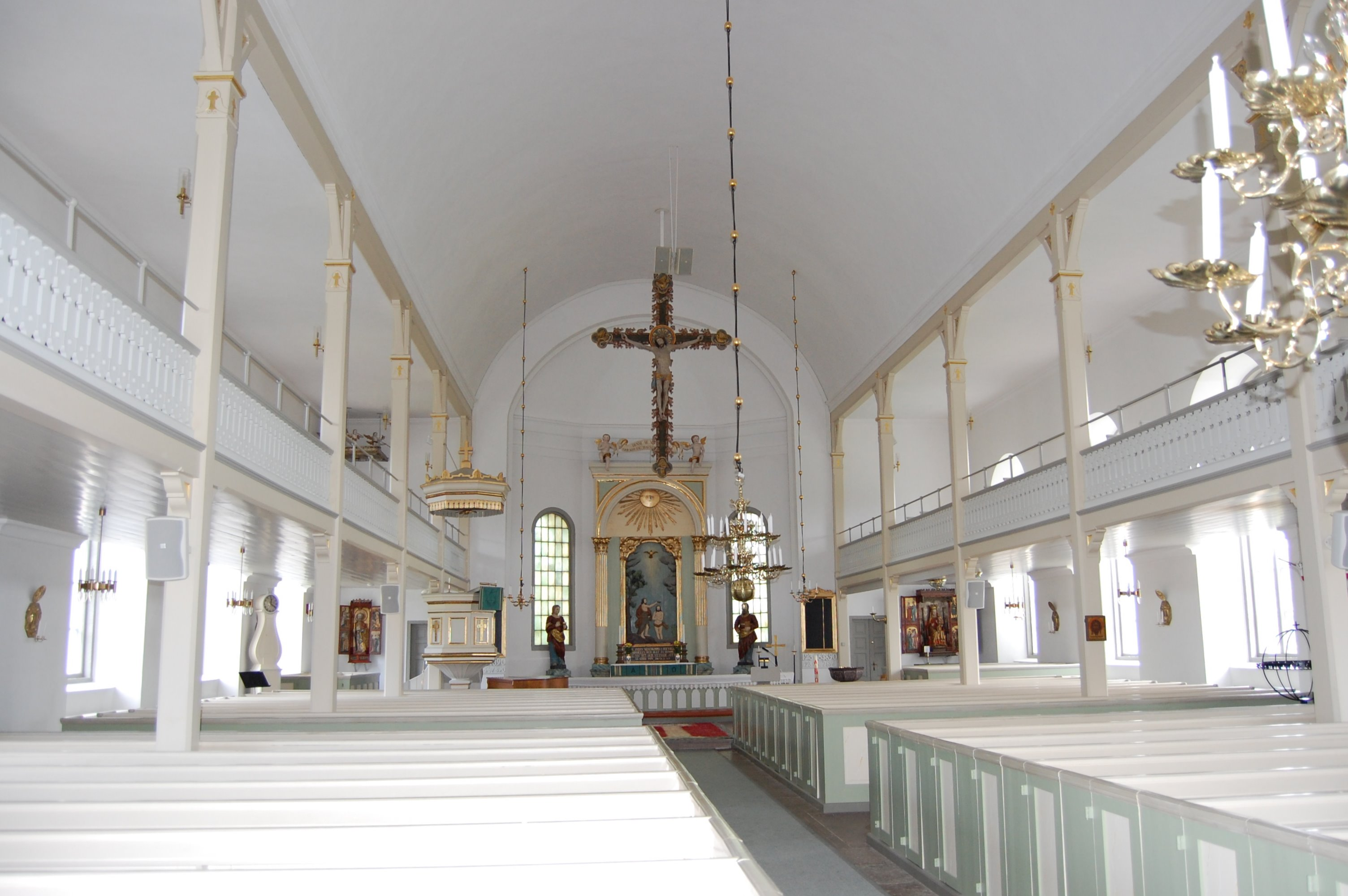 Kirche von Högby, Innenraum Blick zum Chor